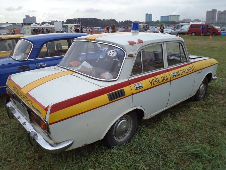 Veřejná bezpečnost (руск. "Вержейна Безпечност")Служба общественной безопасности ЧССР